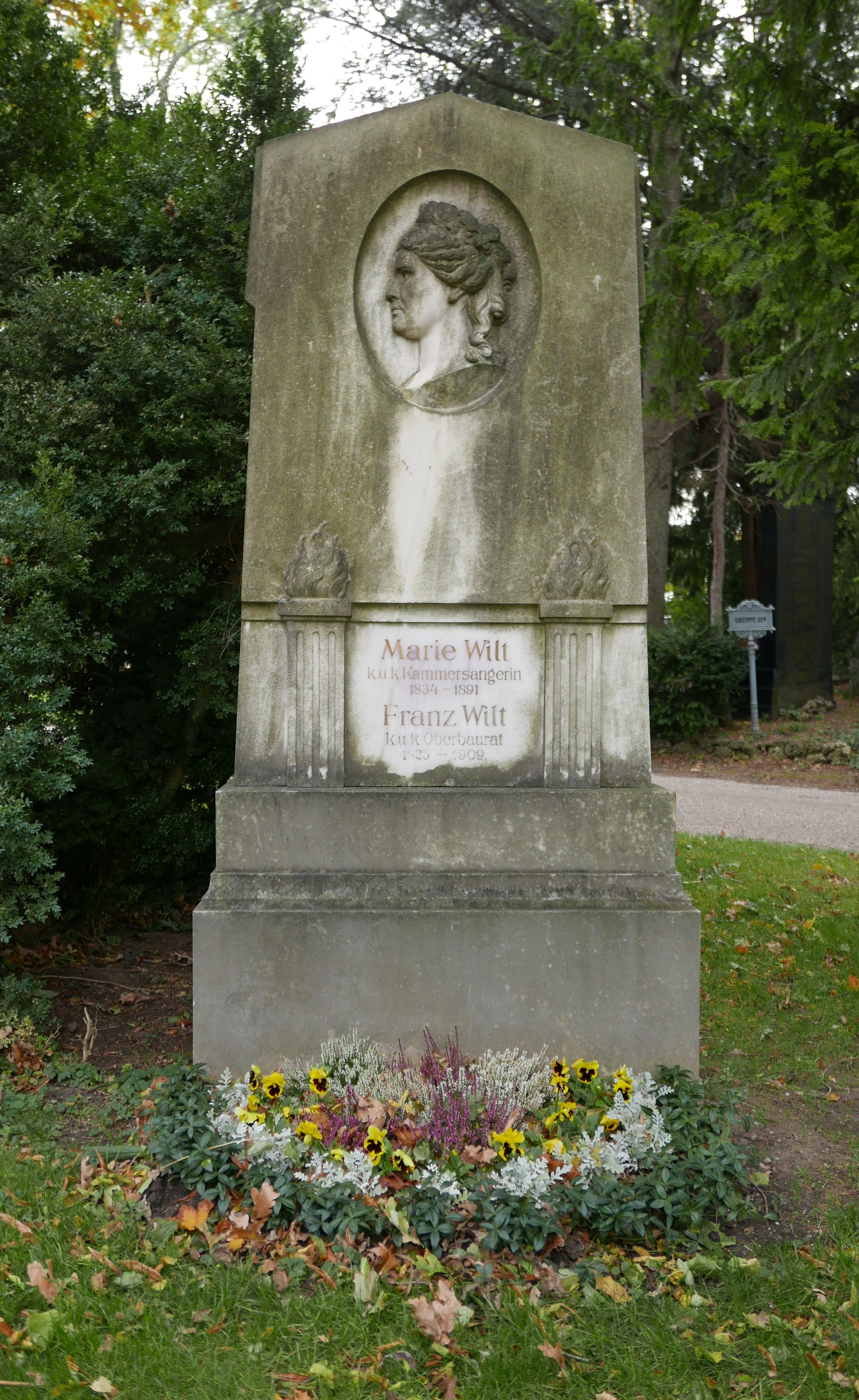 Wiener Zentralfriedhof Allerheiligen 2017: Grabmal Marie und Franz Wilt